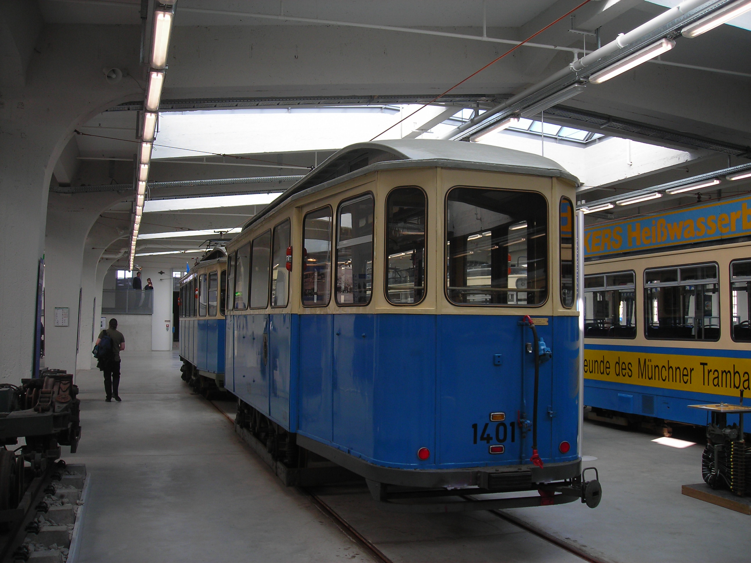 A müncheni MVG múzeum egyik villamosa